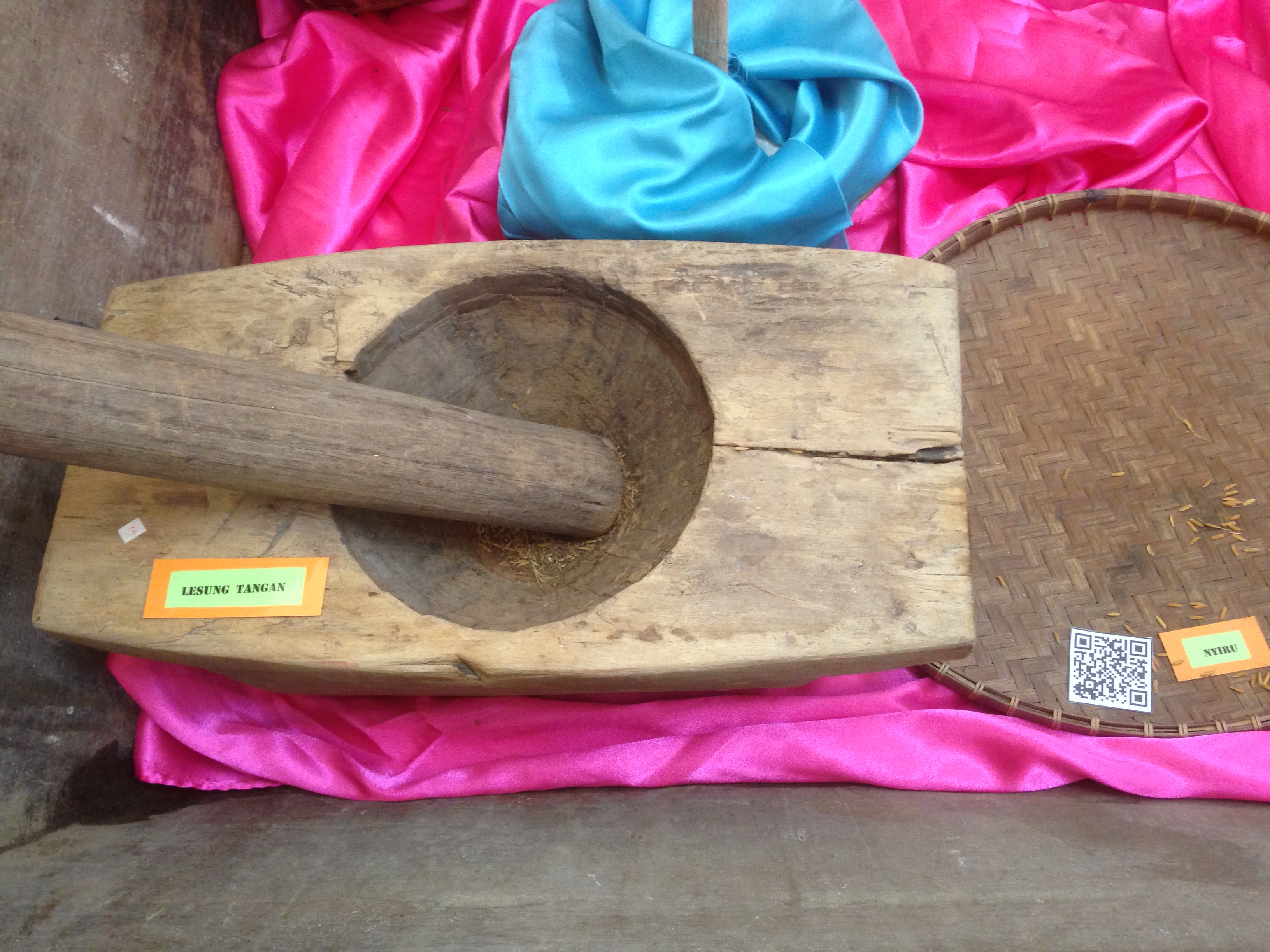 LESUNG TANGAN